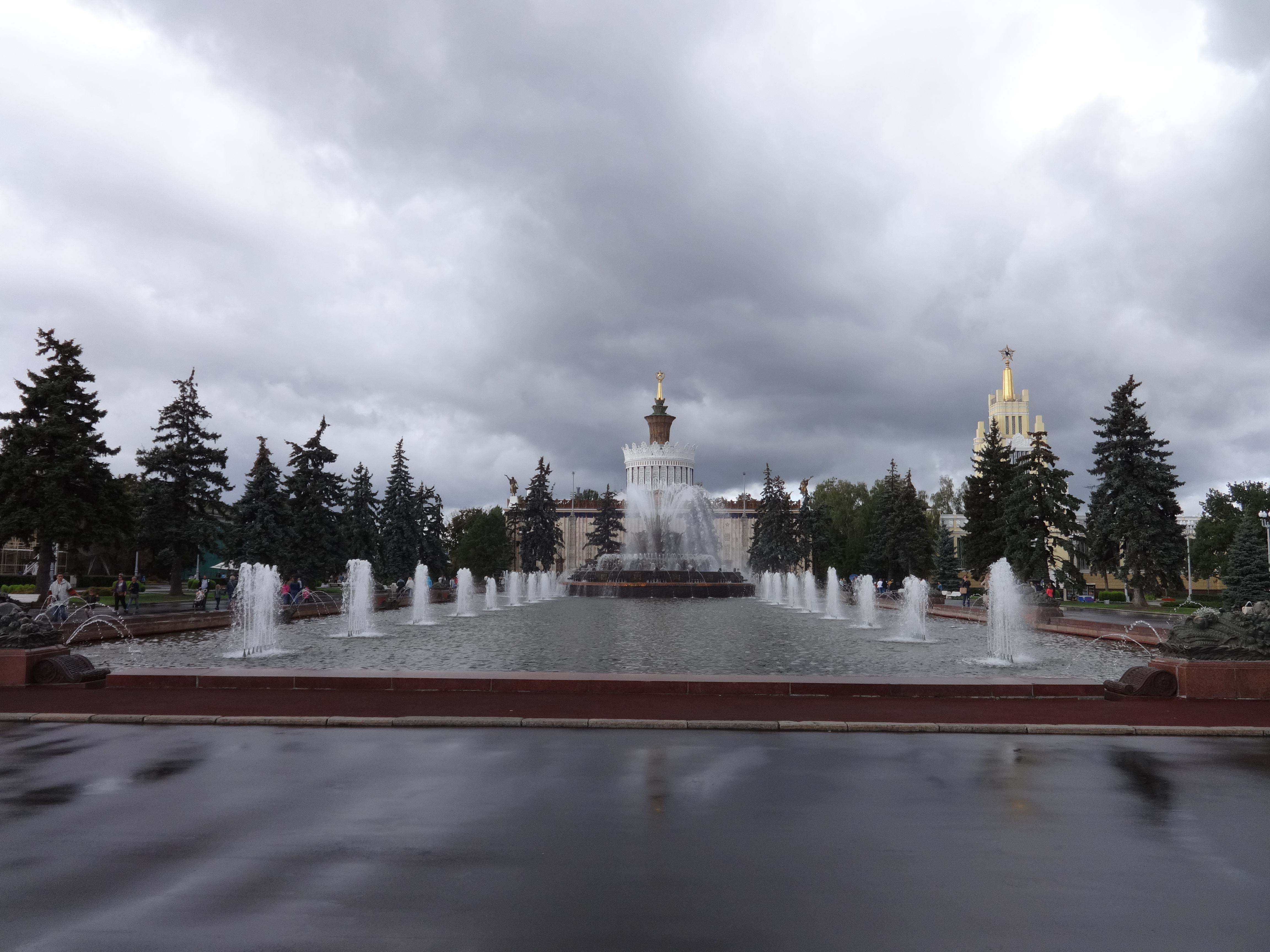 Фонтан «Каменный цветок» (Москва и Московская область, Москва, Мира проспект, 115)